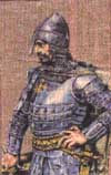 Konrad Mazowiecki, książę Polski, princeps (senior).